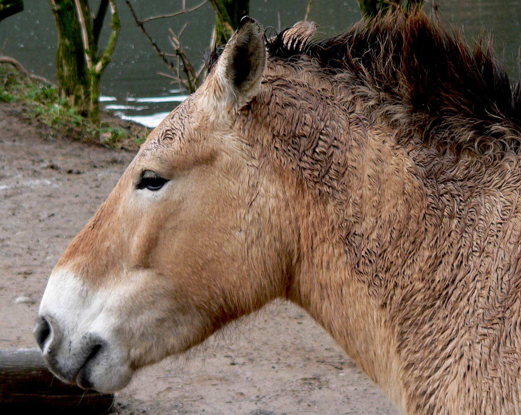 Portrait Przewalski-Horse